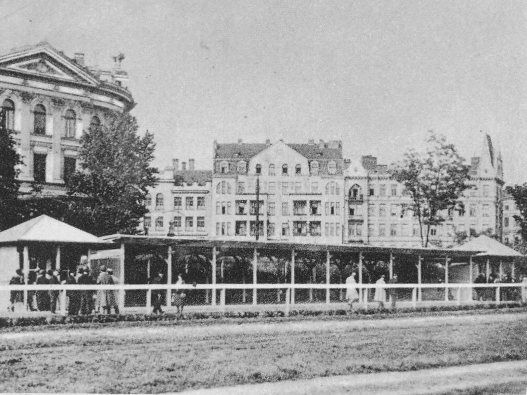 Obecny plac Politechniki, tor wyścigów konnych na Polu Mokotowskim